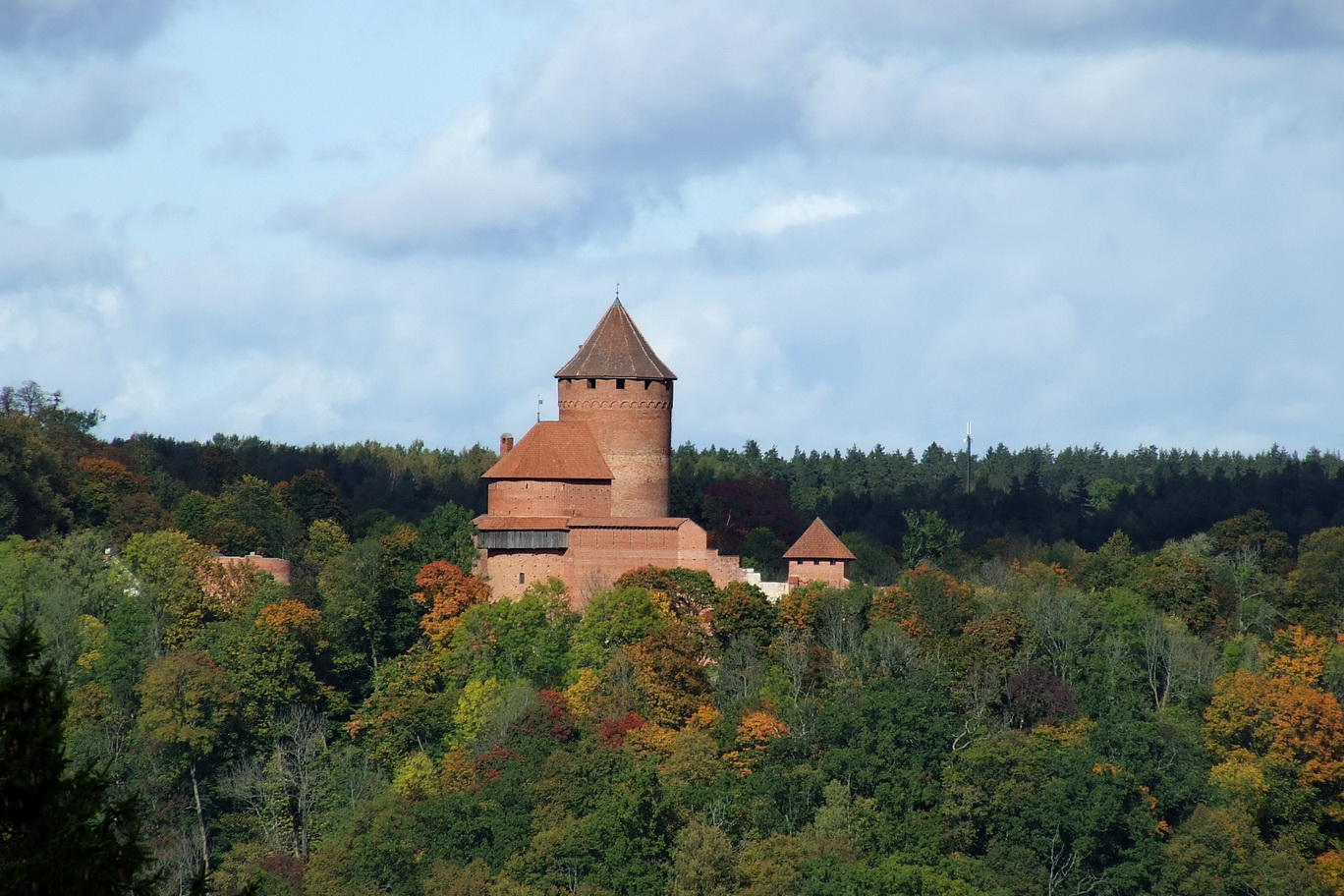 Turaida Castle